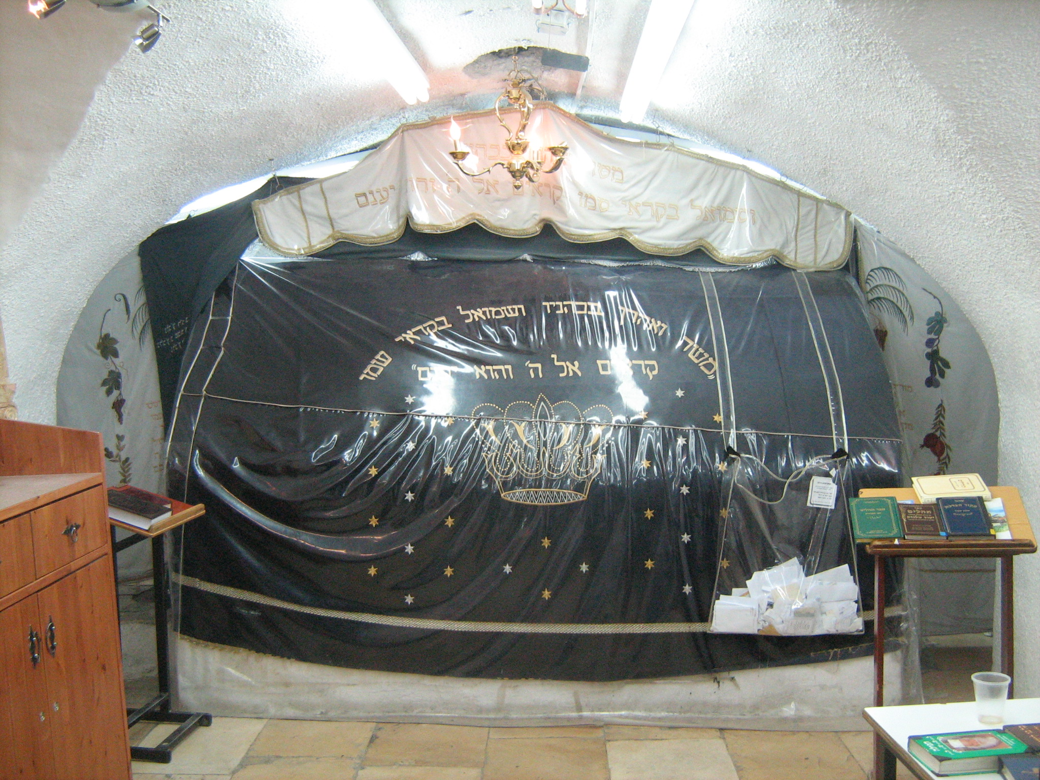 נבי סמואל